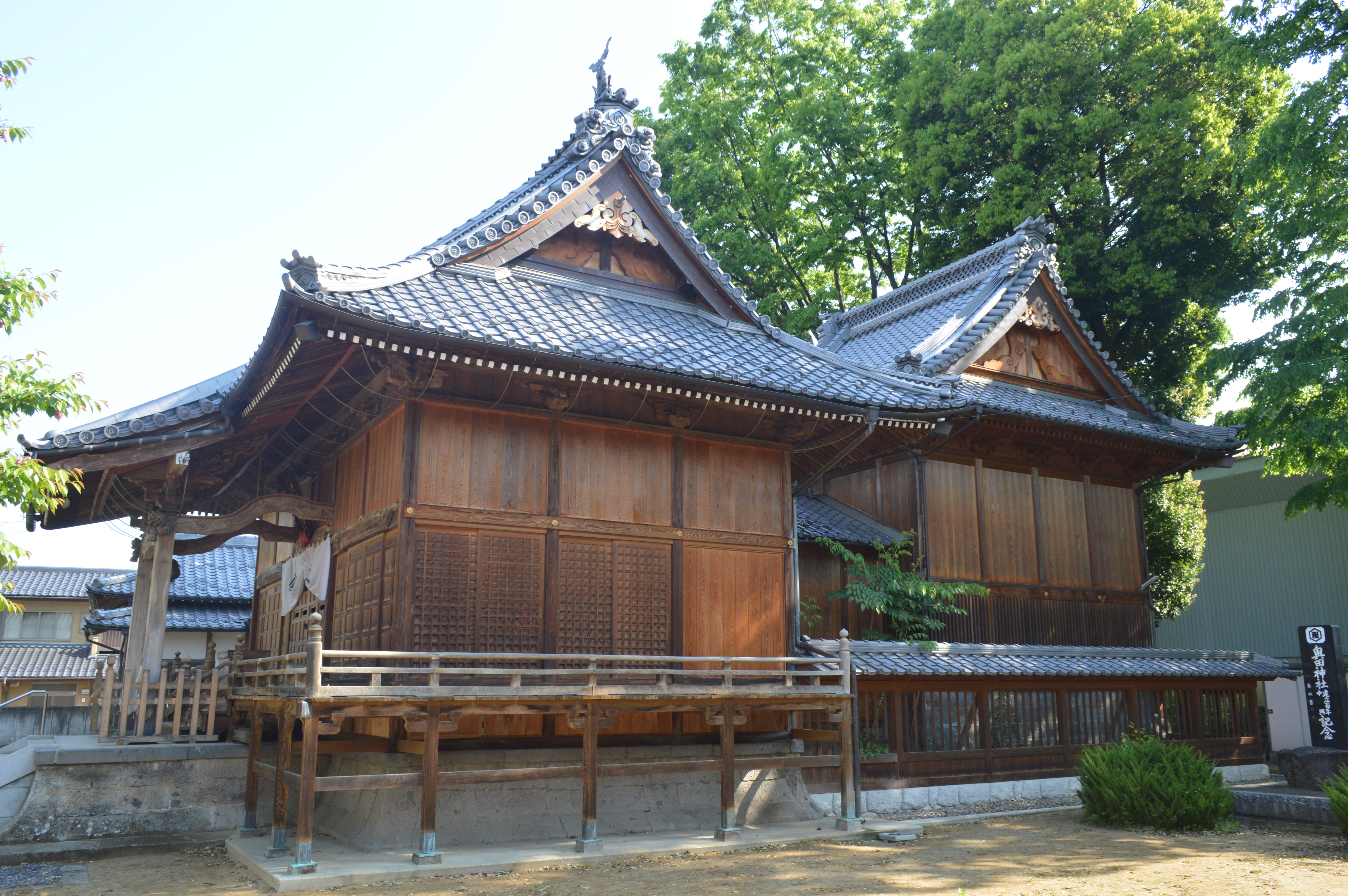 長野県須坂市の奥田神社。